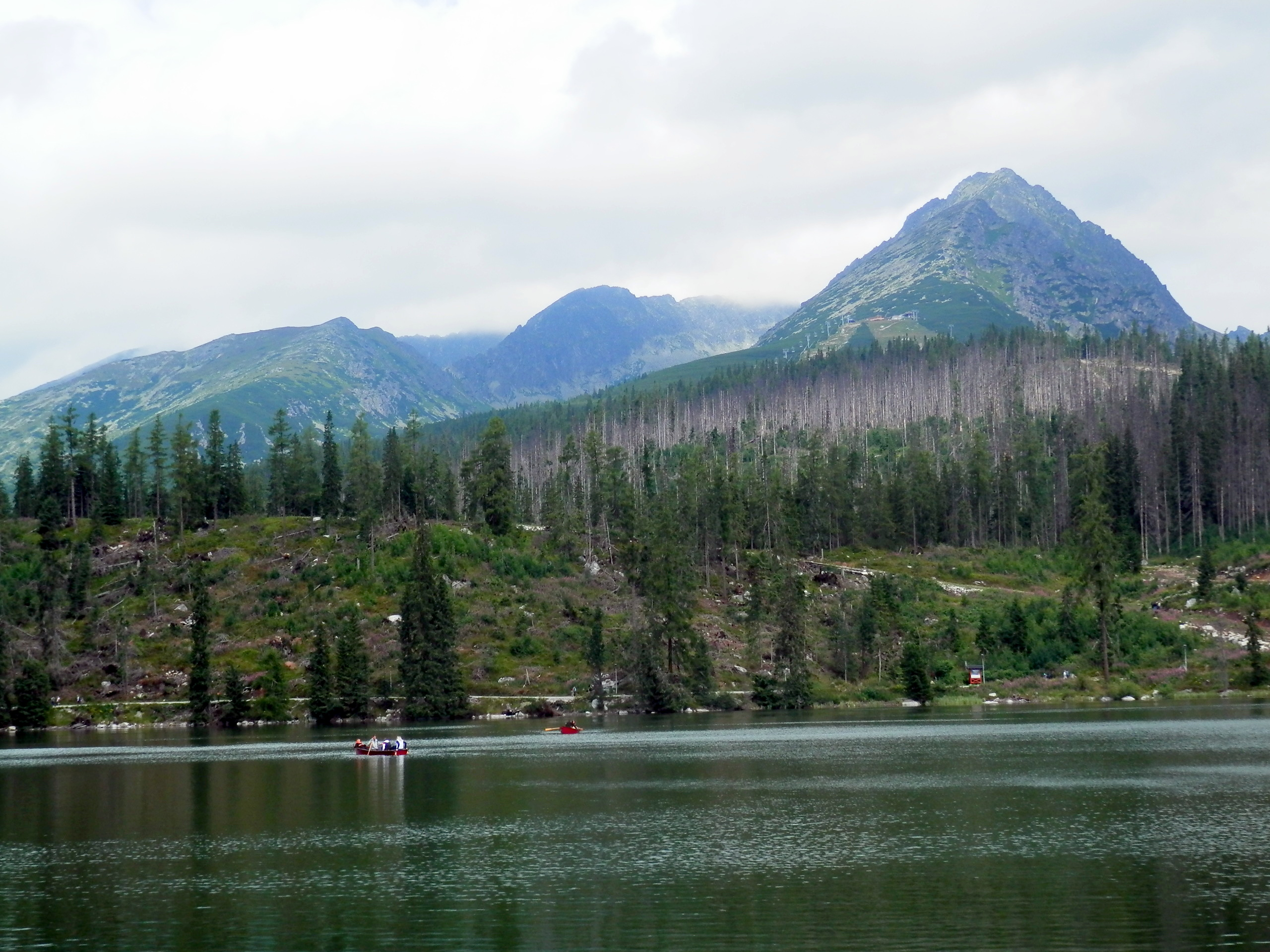 Horské jazero Štrbské pleso a jeho okolie.